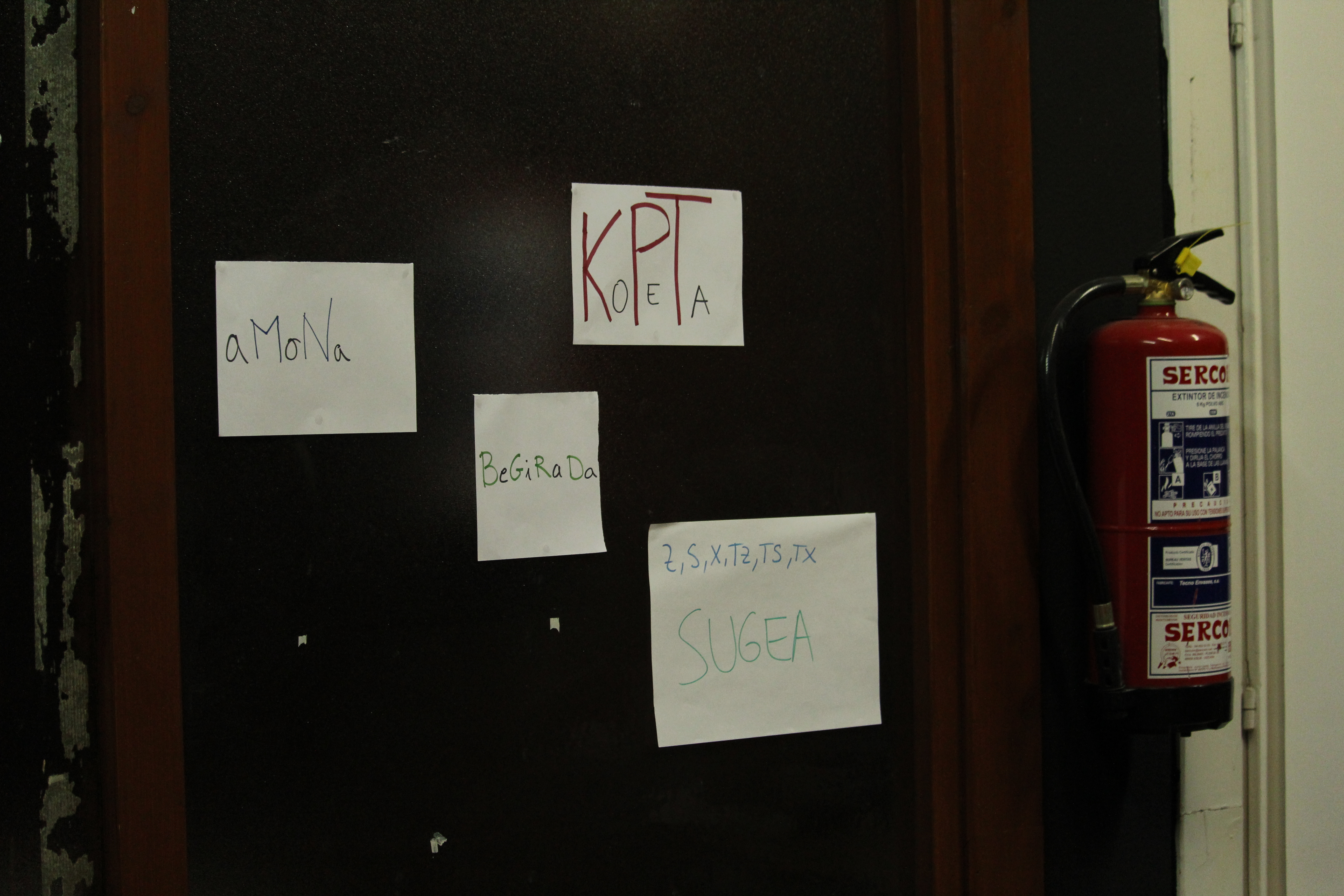 Errimak Egilea: Julen Bellan